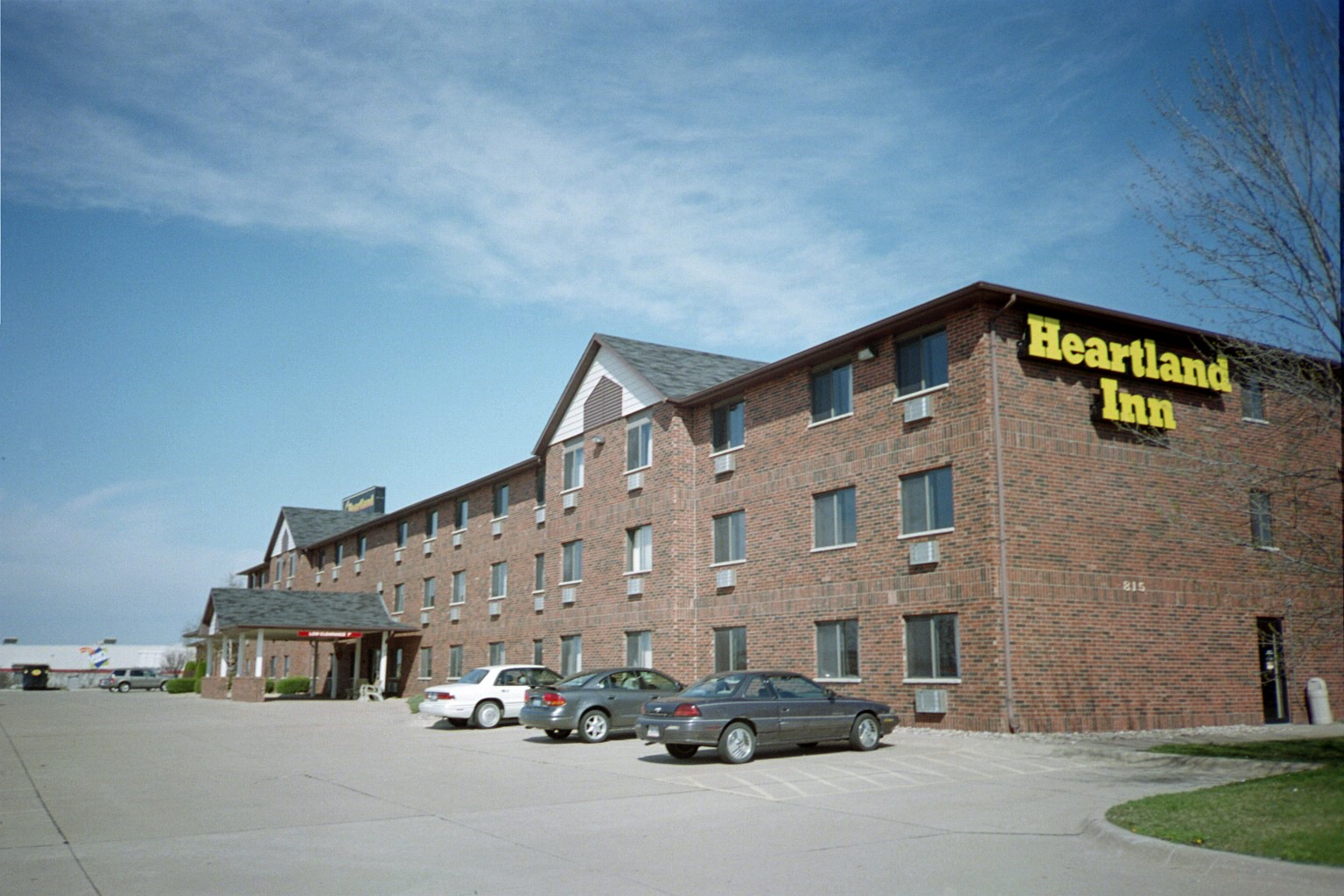 Heartland Inn Bettendorf, Iowa